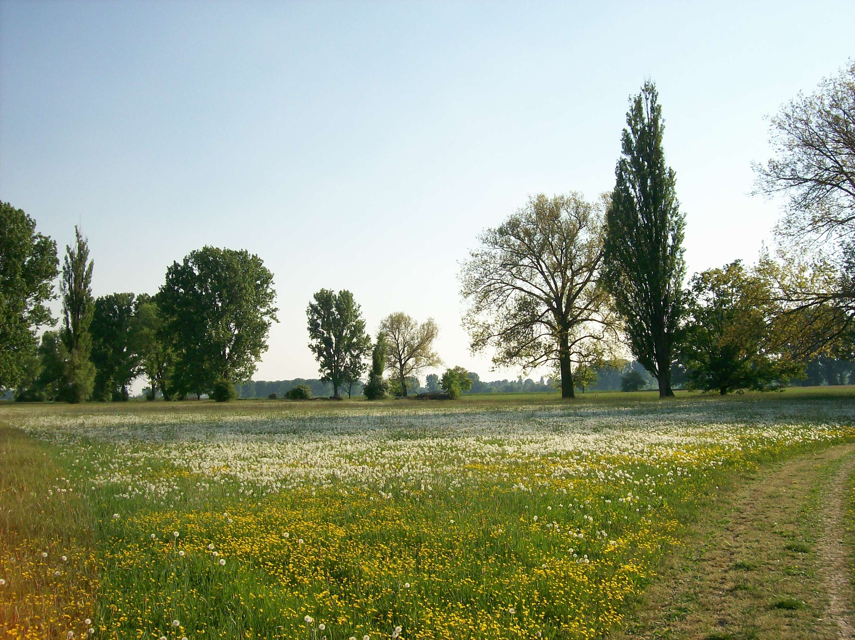 Naturschutzgebiet „Lampertheimer Altrhein“ (Biedensand) - Blumenwiese beim Steg - Jagdgebiet des Neuntöters